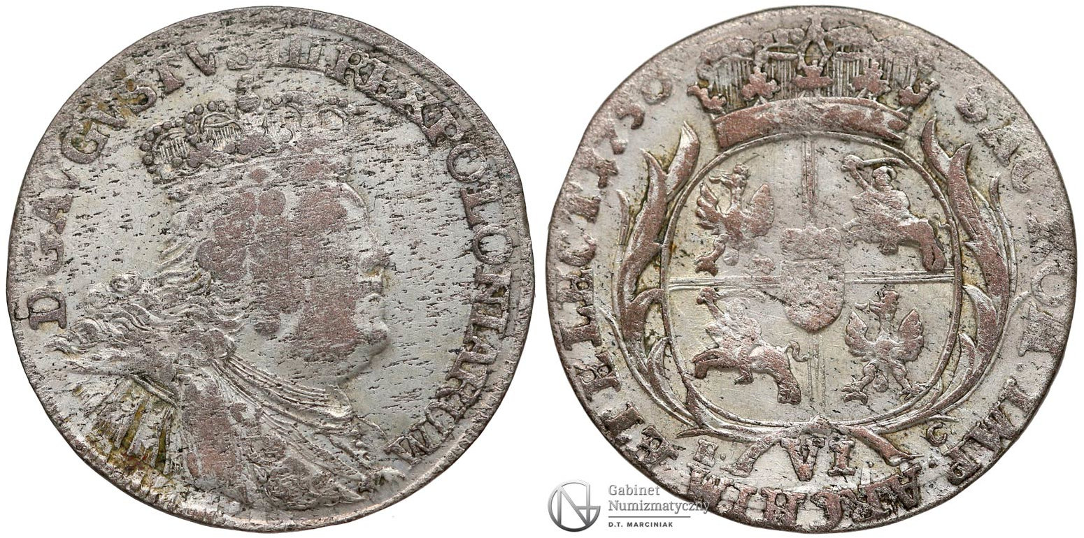 Fałszerstwo pruskie szóstak 1756